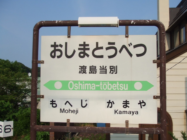 渡島当別駅 駅名看板